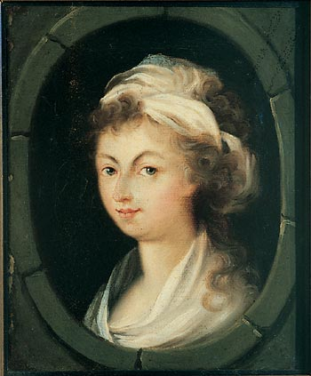 Ritratto della principessa Maria Antonia di Borbone